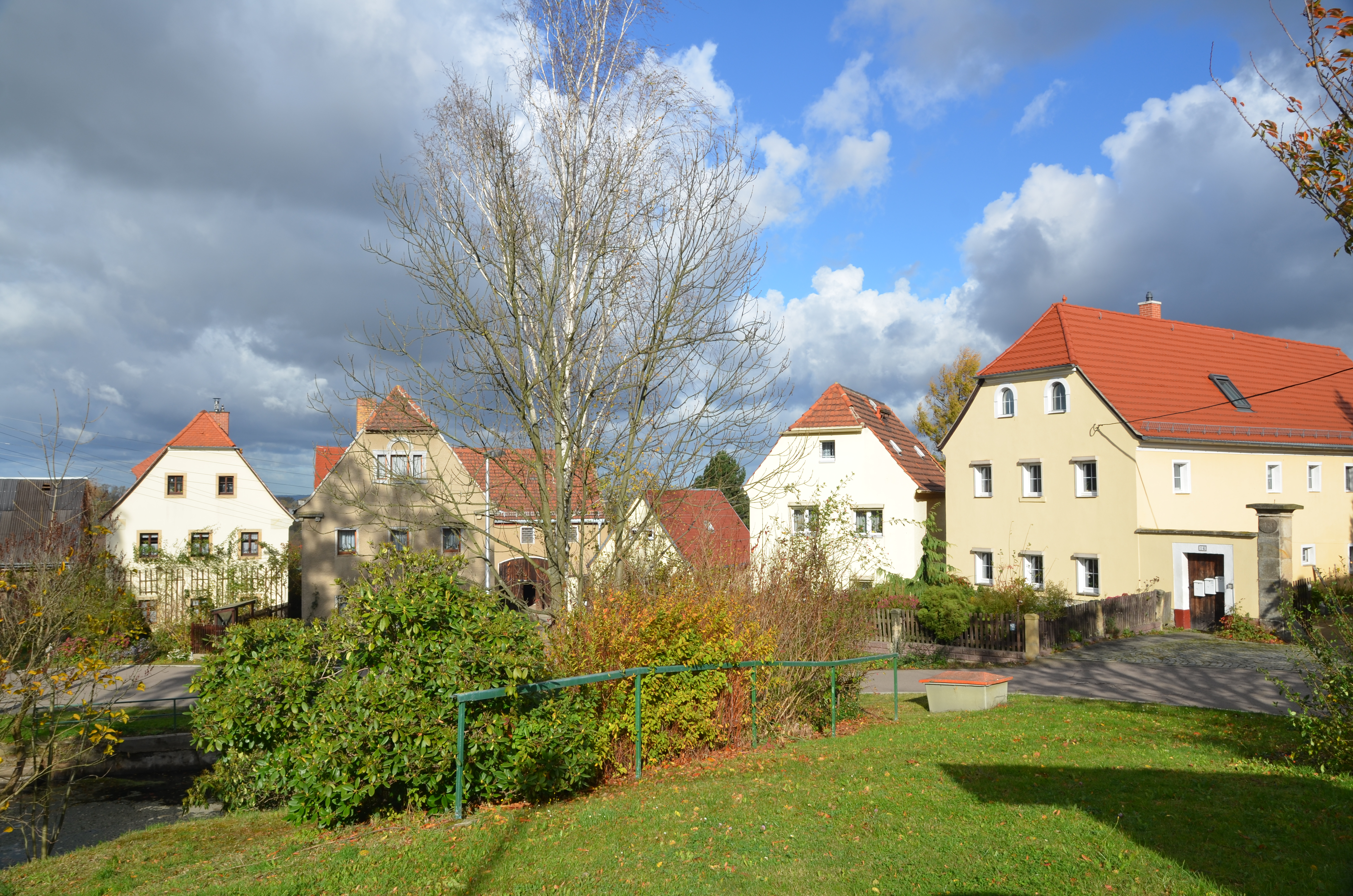 Burgstädtel - Rundling (2017), Am Rundling 13, 14, 15 und 16